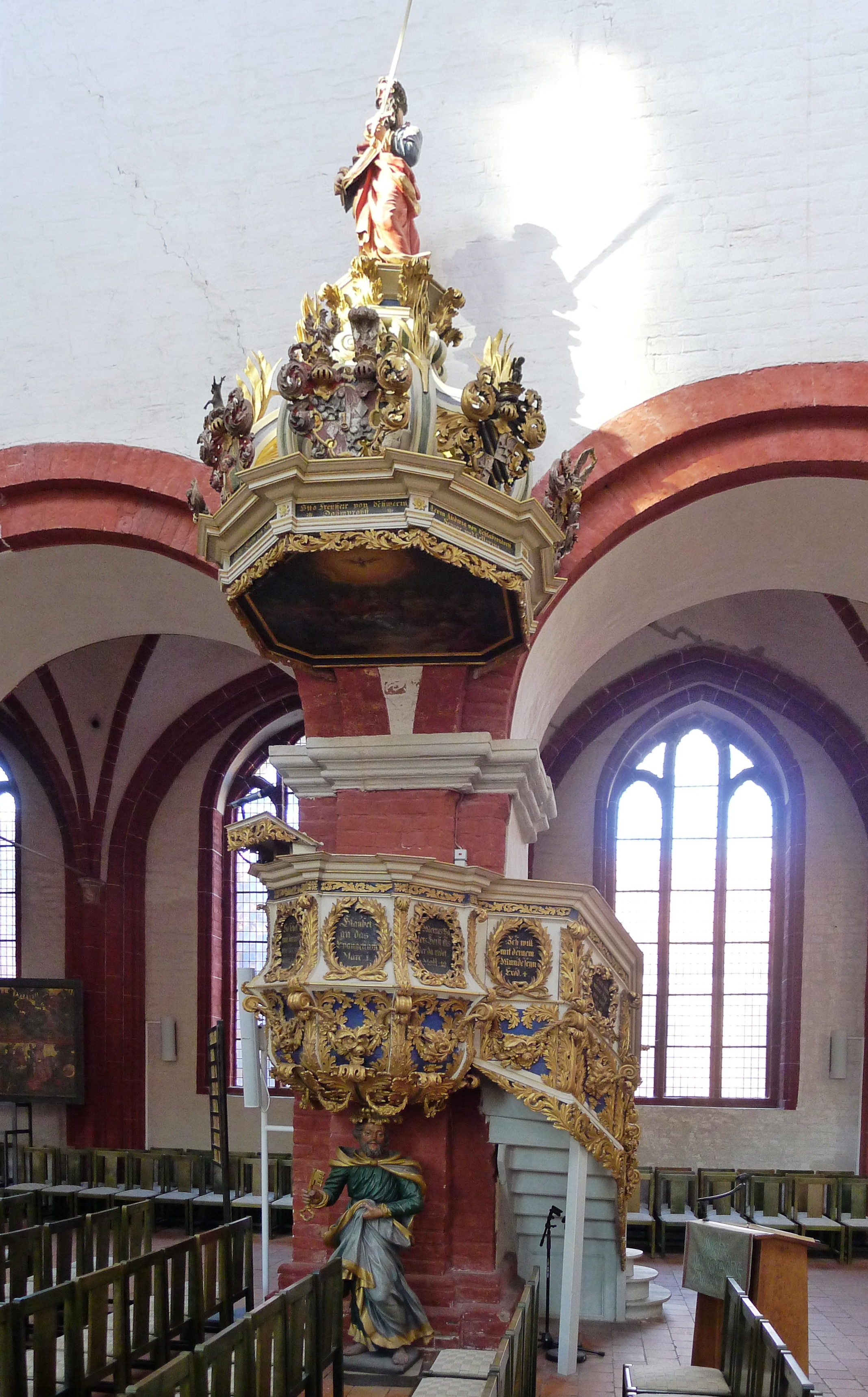 Kanzel des Doms